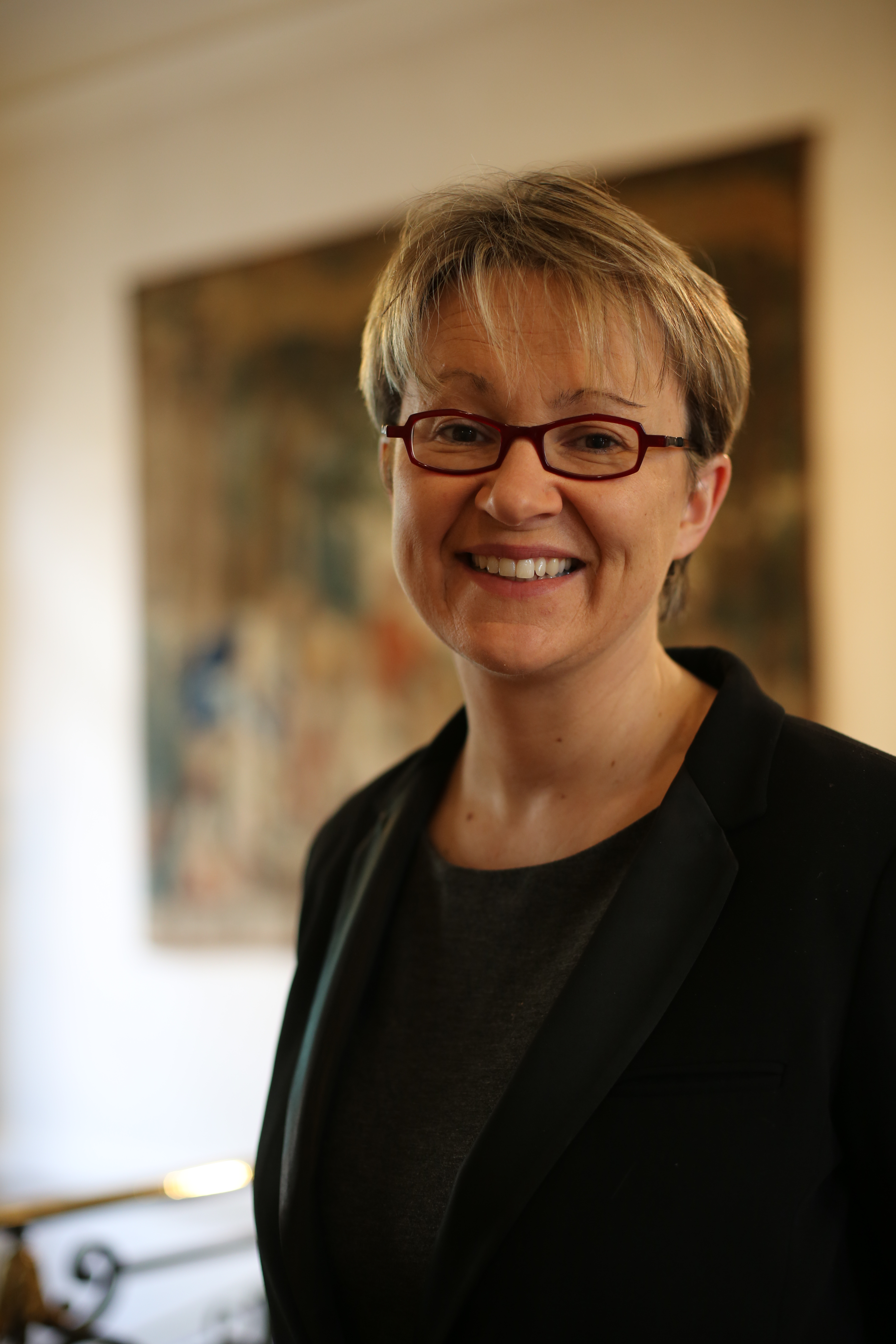 Nathalie Appéré, alors députée de la 2e circonscription d'Ille-et-Vilaine, et candidate PS à la mairie de Rennes